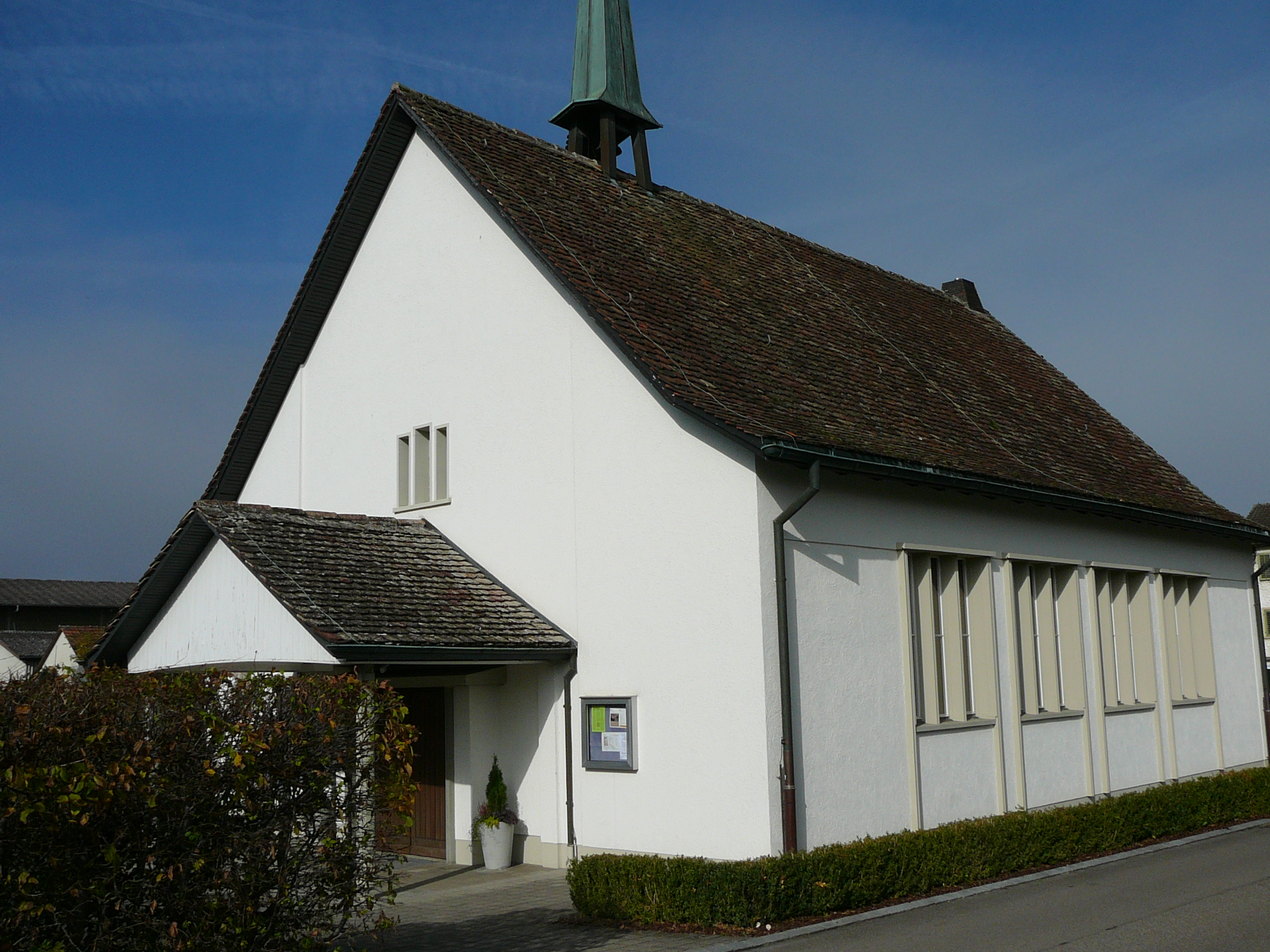 Römisch-katholische Pfarrkirche St. Judas Thaddäus Eglisau, Ansicht von Südosten